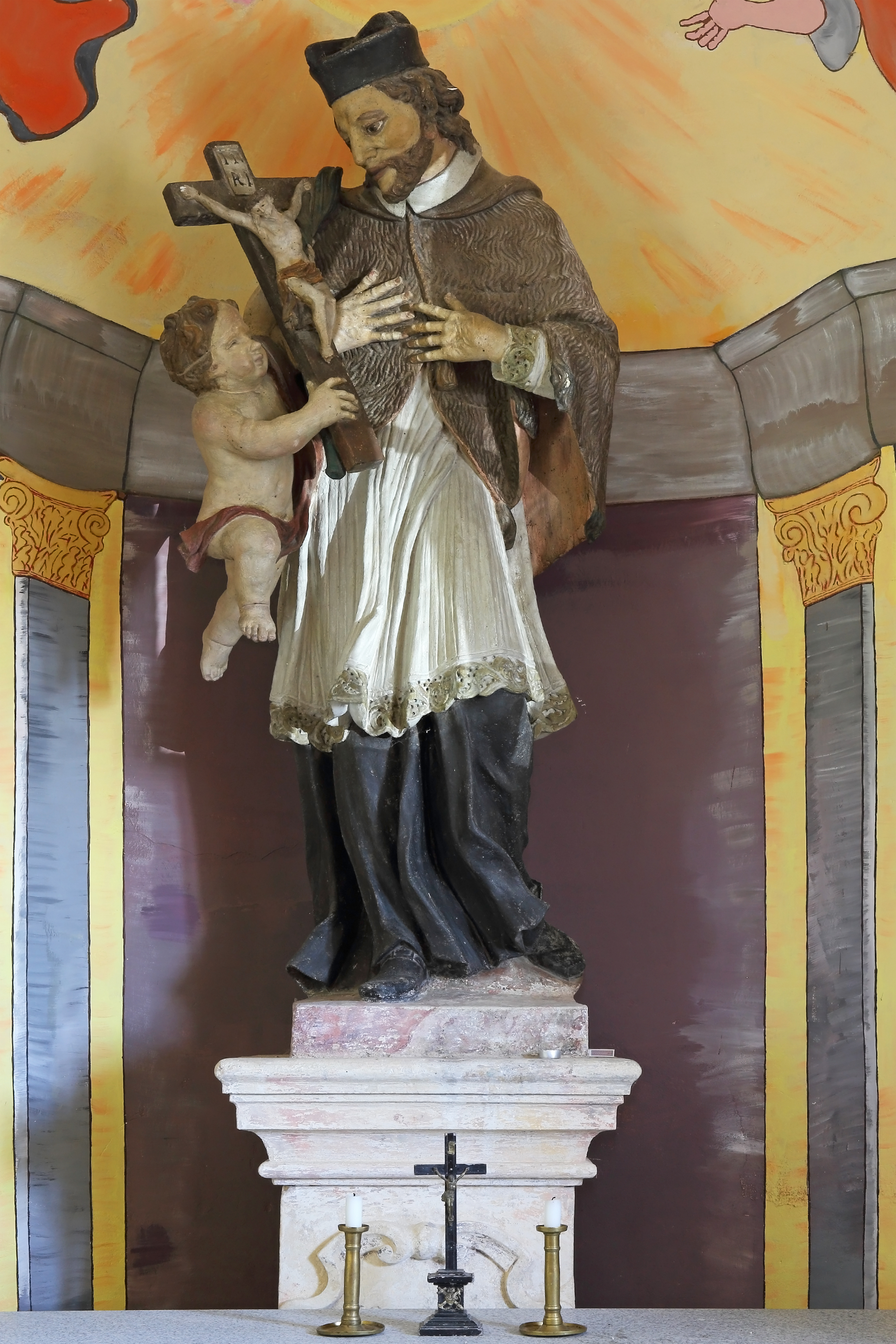 An der Straße von Pernegg nach Posselsdorf steht in einer Wegkapelle eine Statue Johannes Nepomuks.